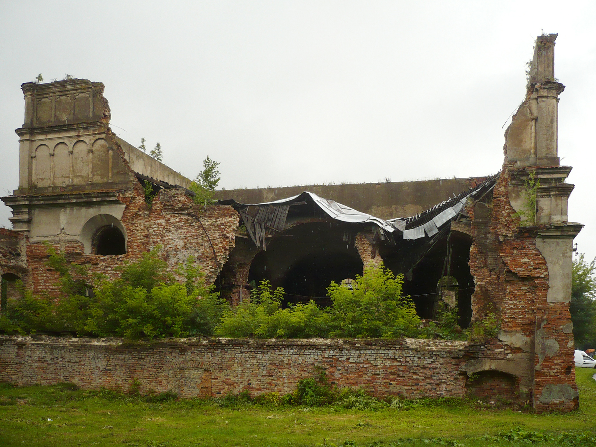 Synagoga w Brodach na Ukrainie